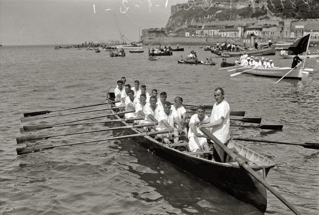 Título original: Regatas en la bahía de la Concha (8/10) Localización: San Sebastián (Guipúzcoa)